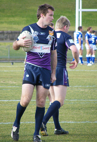 Central Coast playmaker Russell Aitken.